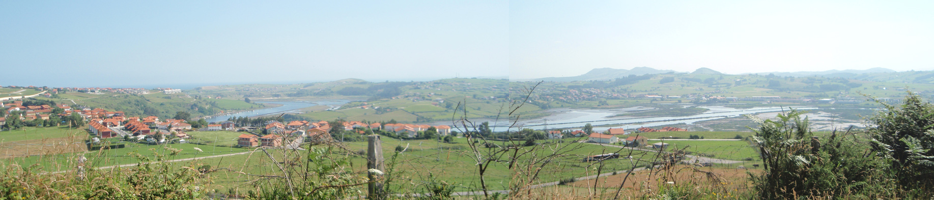 Tramo medio de la ría de San Martín de la Arena o Ría de Suances, en Cantabria, España.